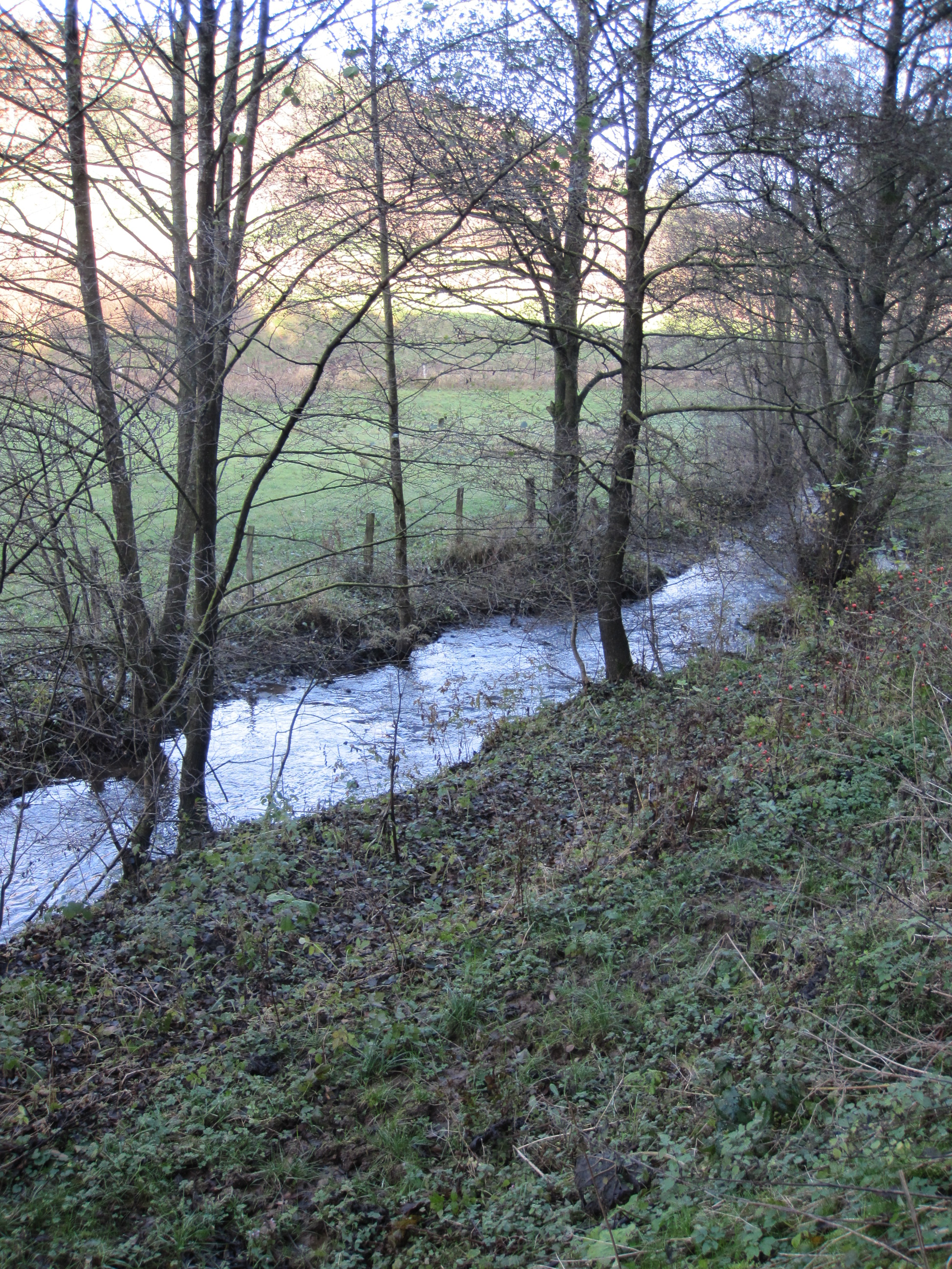 Schaafbach in der Nähe Ripsdorfer Mühle